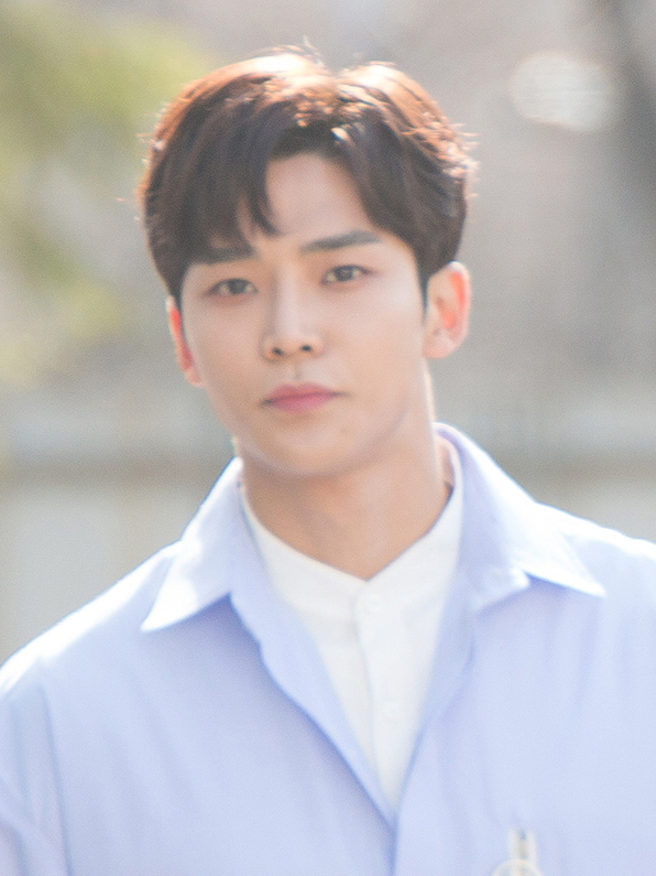 20180311 로운 SF9 인기가요 퇴근길